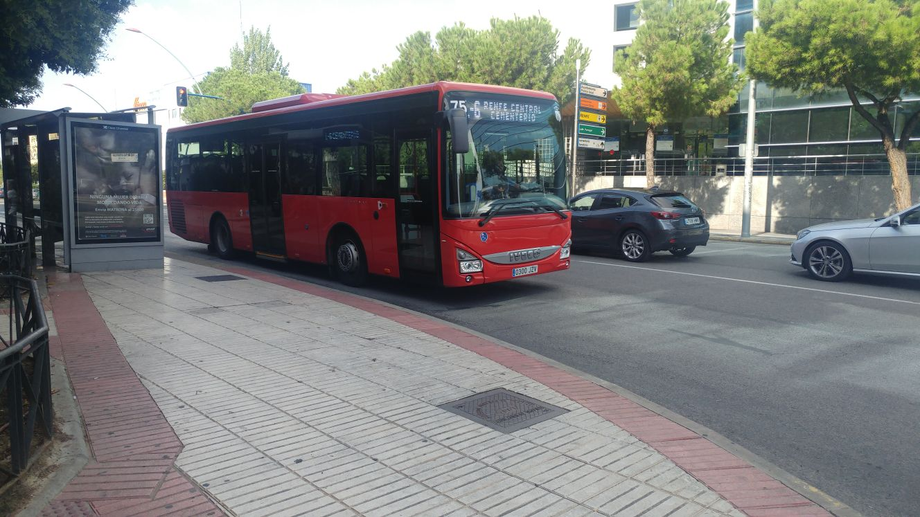 Fotografía de la nueva linea 6 en Fuenlabrada. En la parada de fuenlabrada central